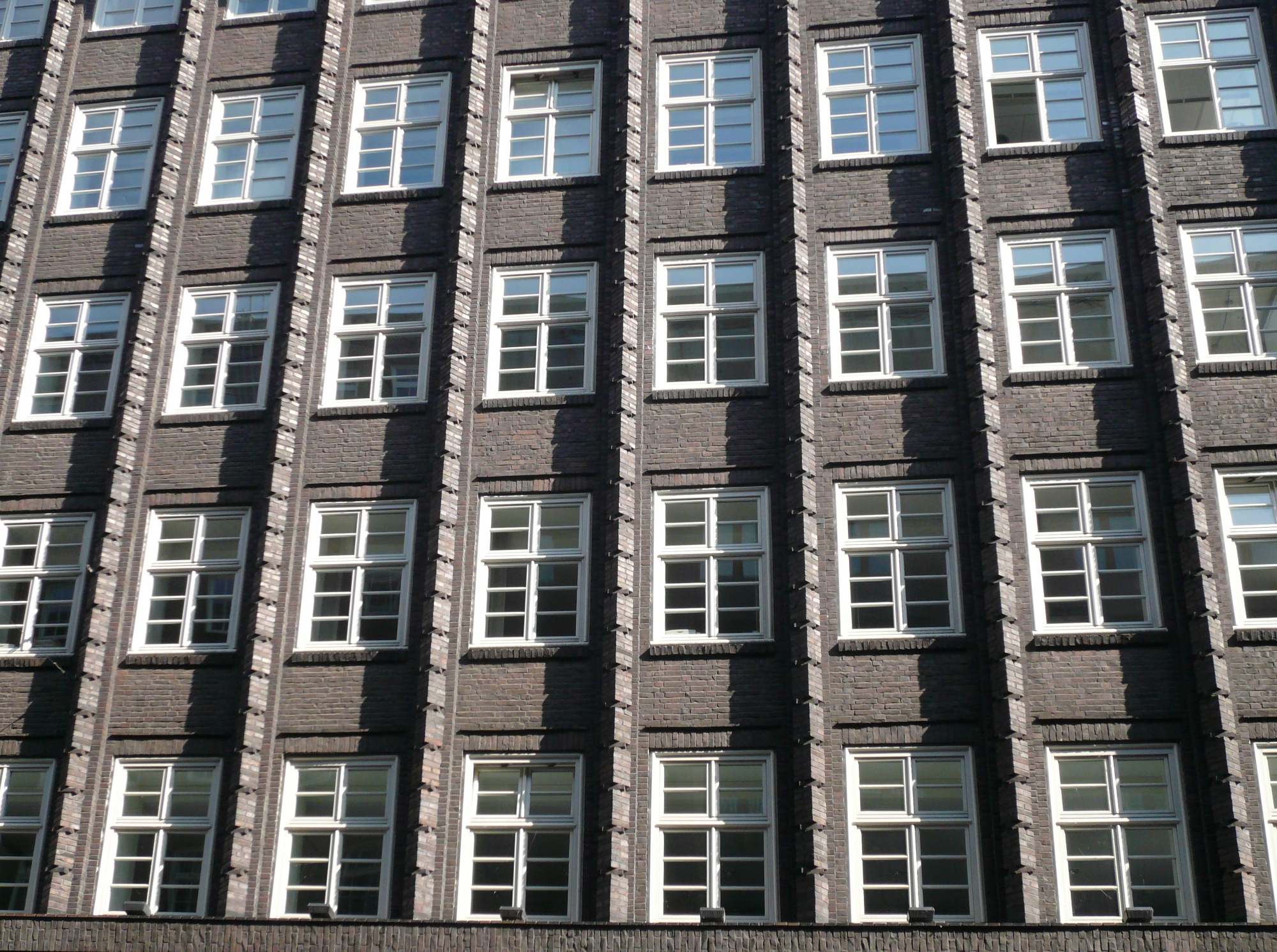 Chilehaus - Nord-Fassade mit Lisernen This is a photograph of an architectural monument.